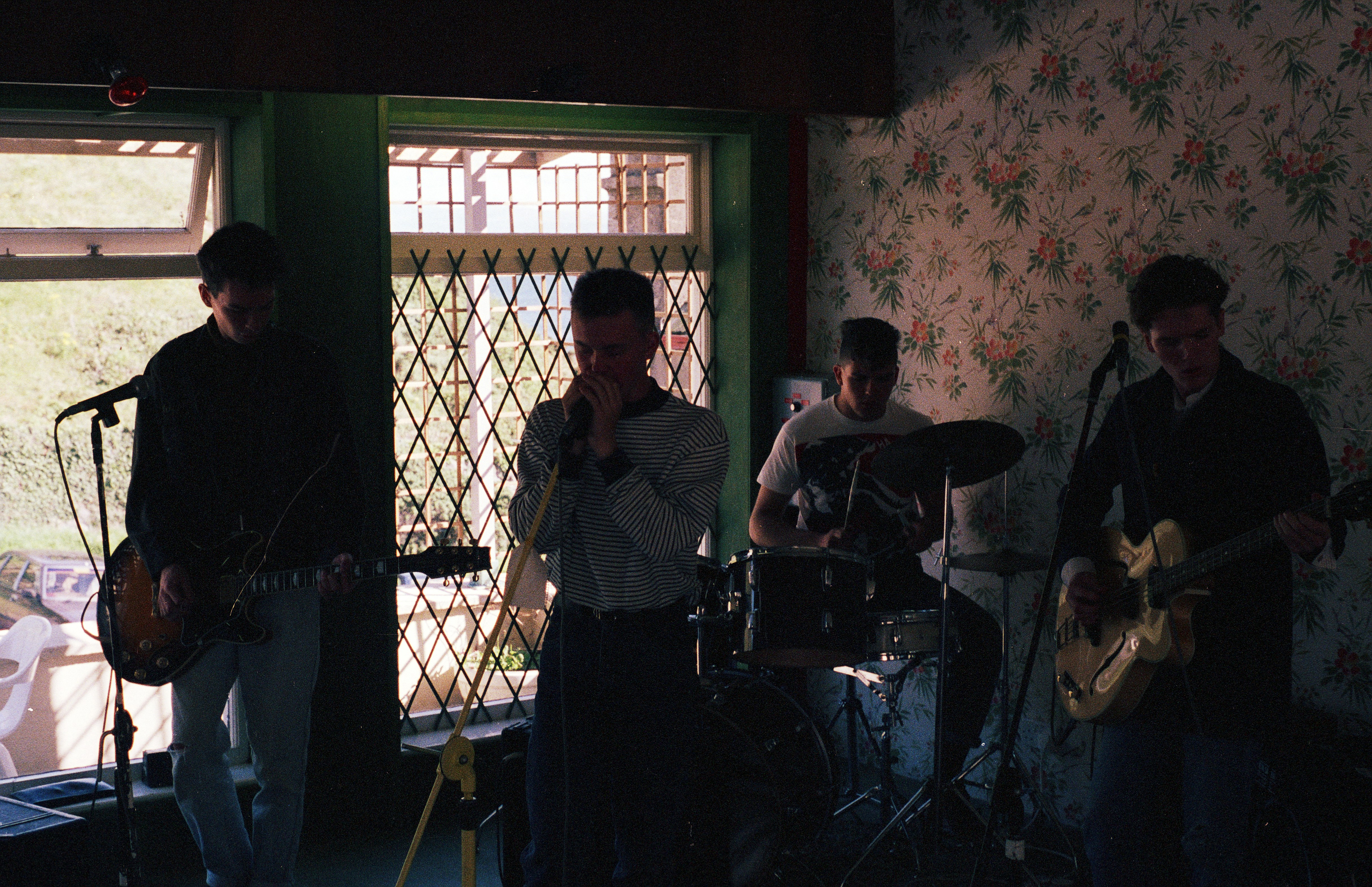 Sion Lewis, Sion Jobbins, Rhisiart Williams a Huw Bunford - Edrych am Jiwlia. Cyngerdd yng Nghricieth adeg Eisteddfod Porthmadog 1987